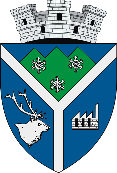 Coat of arms of Azuga, Romania (from ro.wiki: Stema se compune dintr-un scut triunghiular cu marginile rotunjite, partajat în furcă. În prima partiţie, în câmp albastru, trei vârfuri muntoase de culoare verde, peste care broşează trei fulgi de nea argintii. În a doua partiţie, în dreapta, în câmp albastru, se află un cap de cerb, spre stânga, de argint. În a treia partiţie, în stânga, se află o fabrică stilizată, de argint. Toate aceste elementele sunt separate de doua linii argintii care se unesc în vârful scutului. Scutul este timbrat de o coroană murală de argint cu trei turnuri crenelate. Vârfurile muntoase simbolizează potenţialul turistic al zonei, cu preponderenţă în practicarea sporturilor de iarnă. Capul de cerb sugerează fauna specifică zonei. Fabrica reprezintă tradiţia industrială a oraşului. Liniile argintii simbolizează cele doua cursuri de apă care traversează oraşul, respectiv râul Prahova şi râul Azuga. Coroana murală cu trei turnuri crenelate semnifică faptul că localitatea are rangul de oraş.)